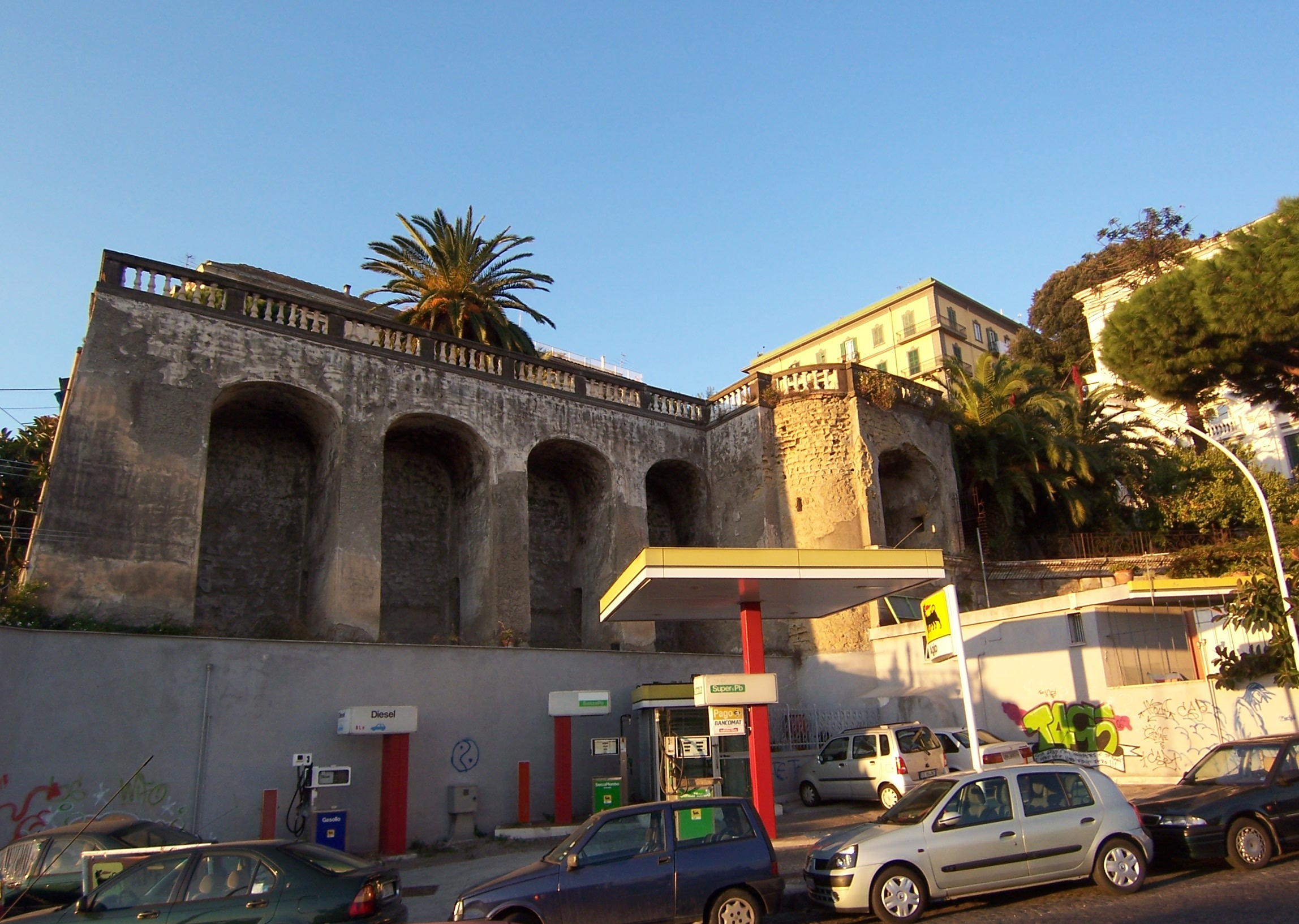 Interlingue: Villa Carafa di Belvedere - Terrapieno